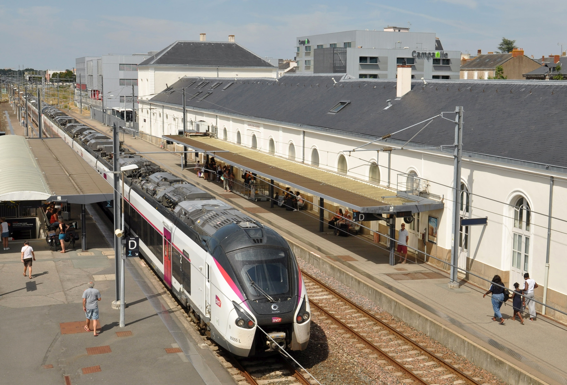 Un Intercités SNCF Bordeaux-Nantes marque l'arrêt à La Roche sur Yon le 2 août 2019